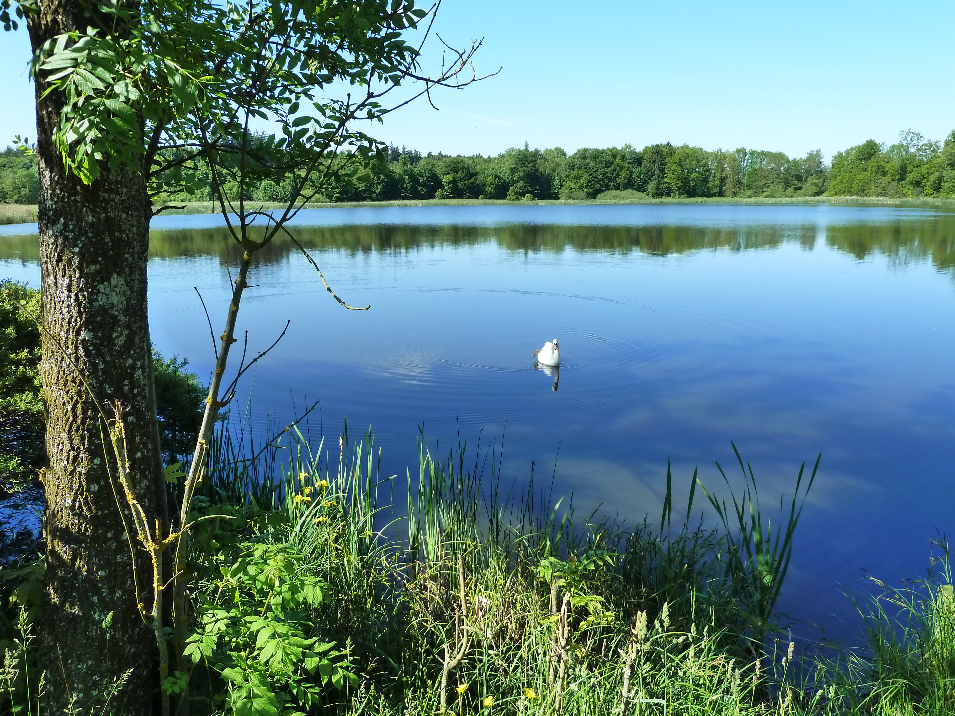 (NSG:BW-4.150) Gutershofer Weiher, Naturschutzgebiet, 88448 Attenweiler-Gutershofen